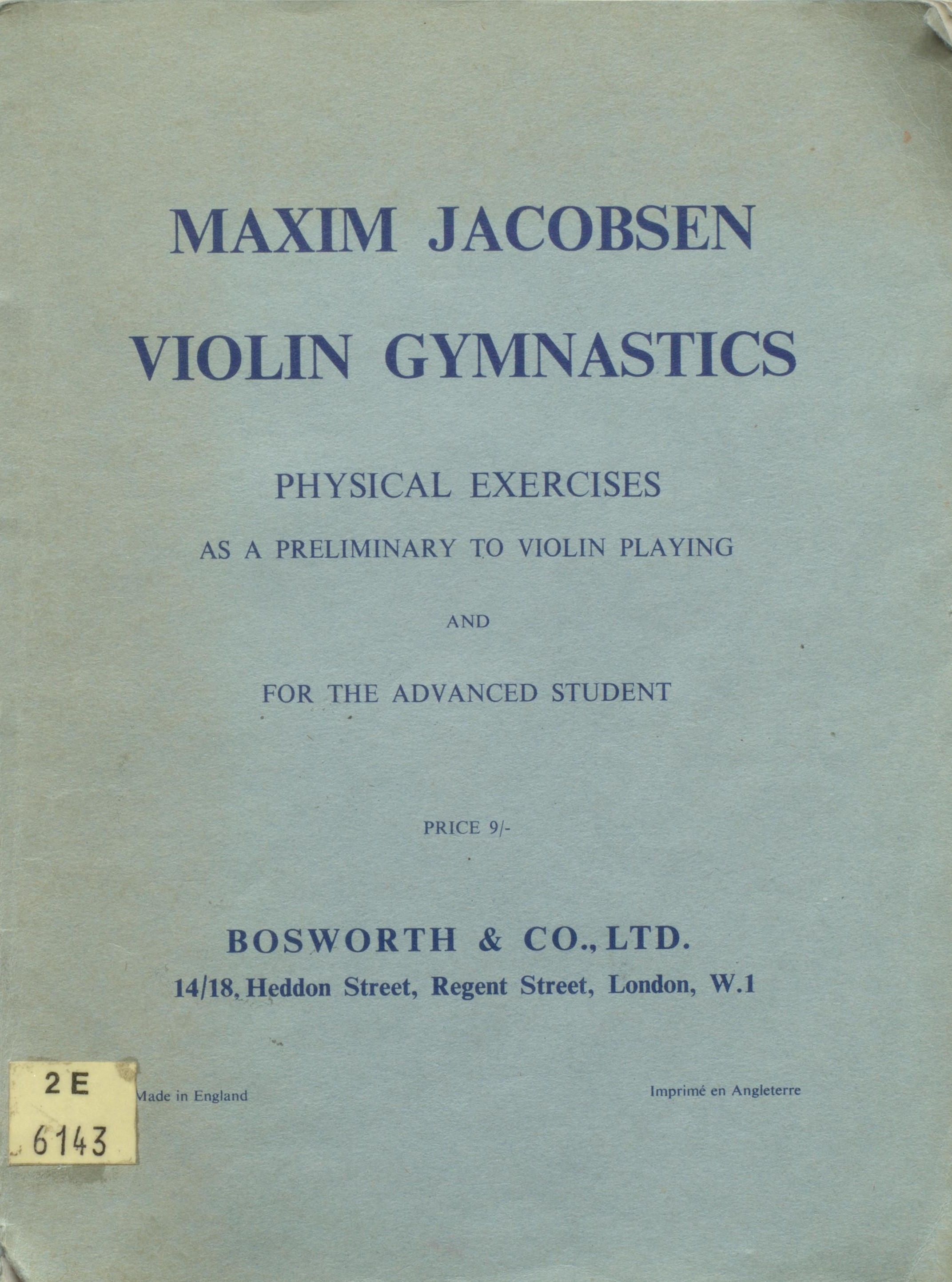 Maxim Jacobsen Violin gymnastics : physical exercises as a preliminary to violin playing and for the advanced student. London : Bosworth, 1960